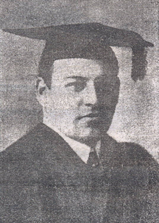 Fotografía del escritor uruguayo Alberto Nin Frías (1878 - 1937)